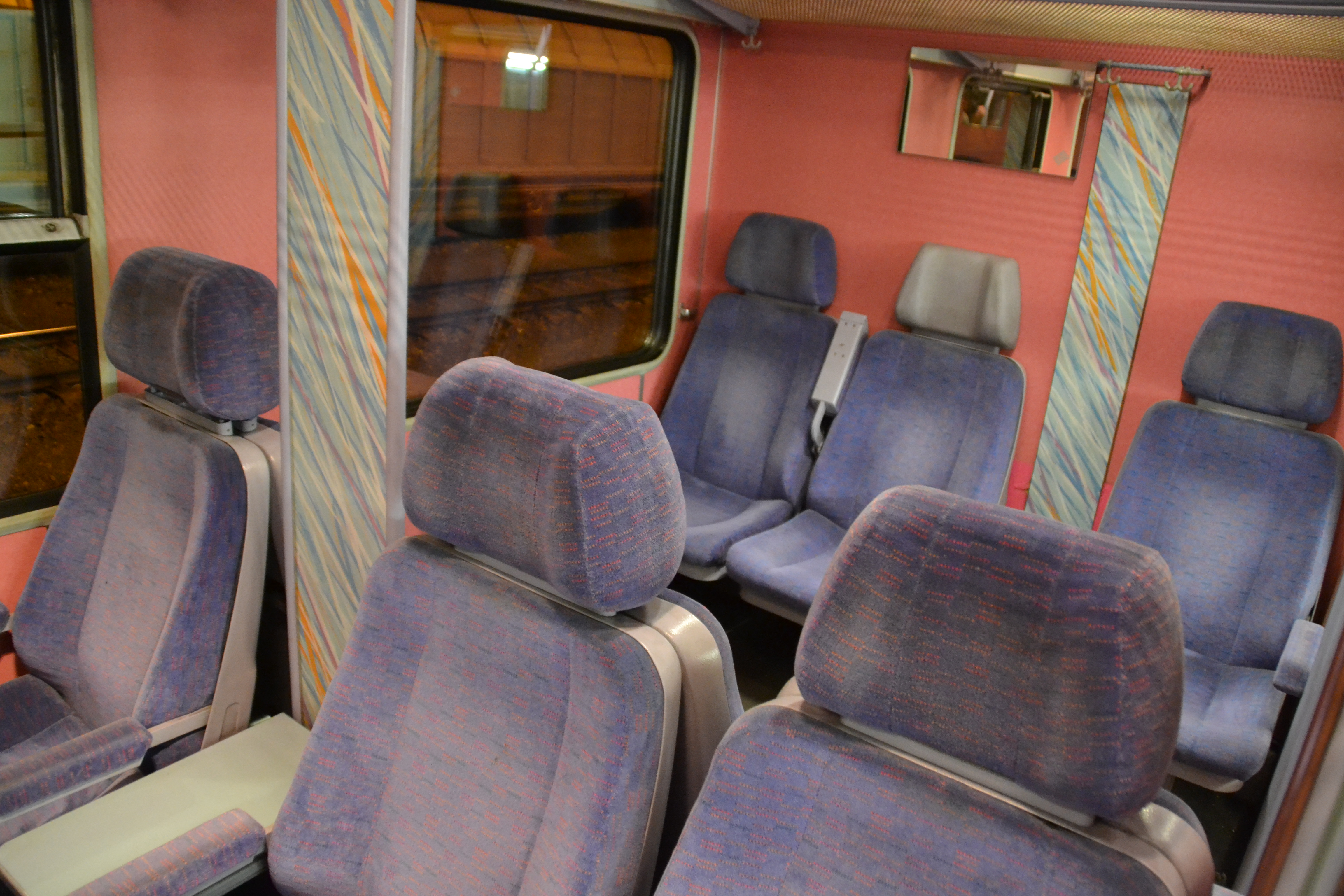 1. osztályú Halberstadti kocsi belseje